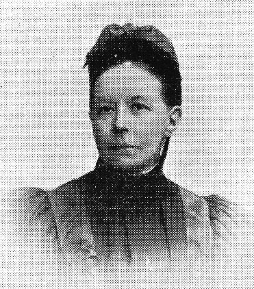 Louise Ulff (28 nov 1852 - 10 maj 1948) under sitt arbete hos Elsa Borg i missionen på Vita bergen.